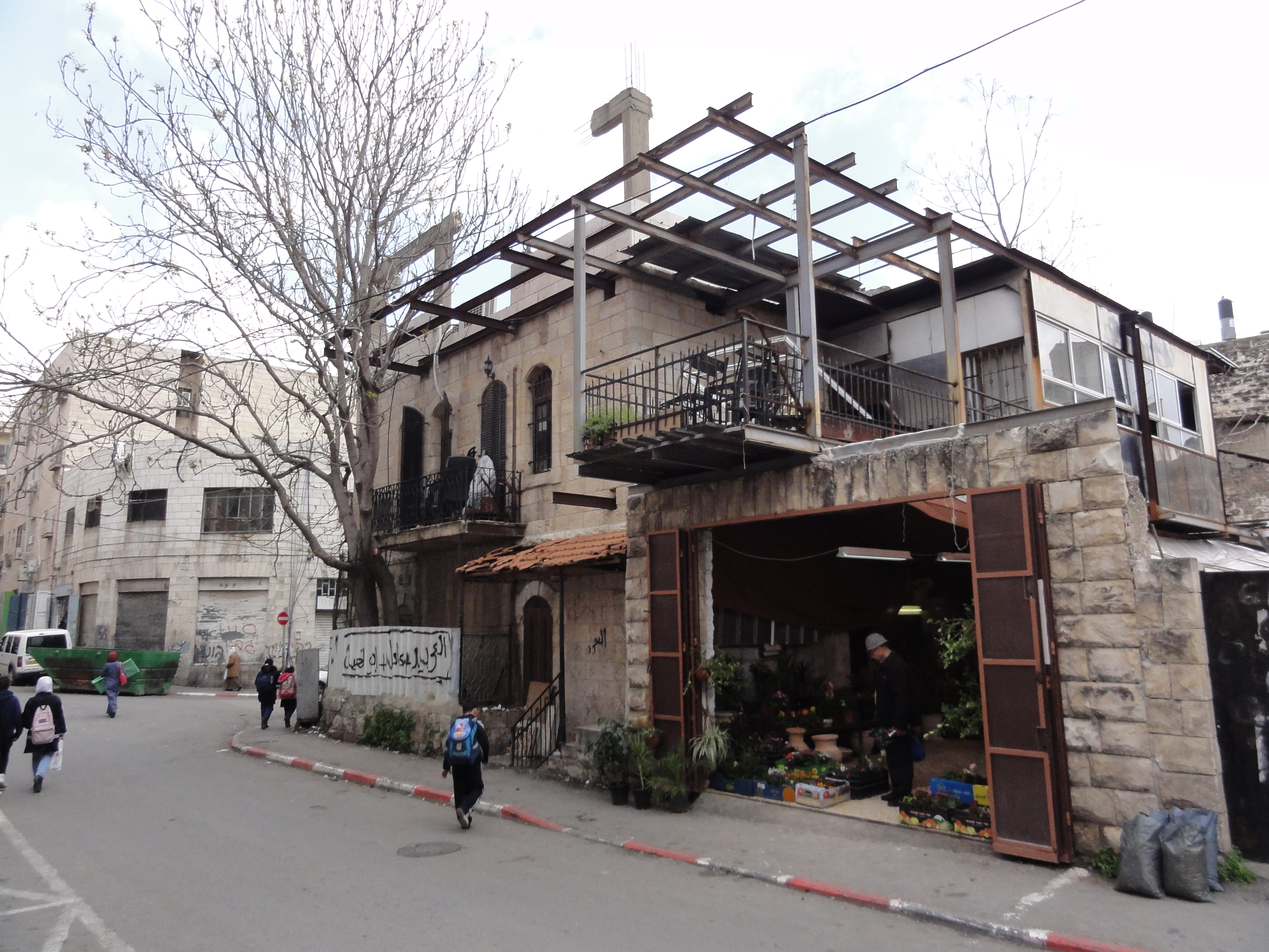 East Jerusalem, Wadi al Joz, Al-Isfahani street